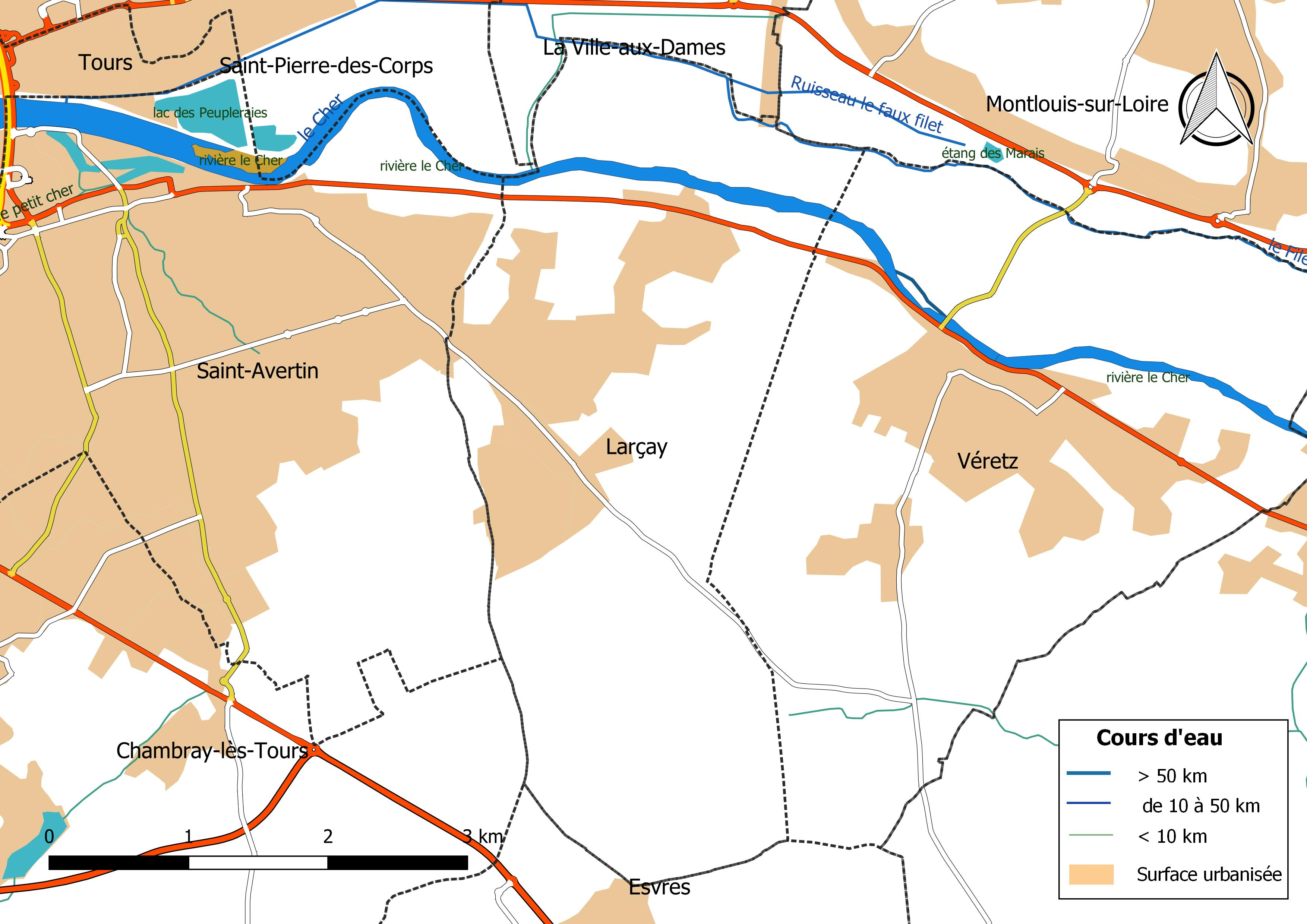 Carte du réseau hydrographique de la commune de Larçay (France).